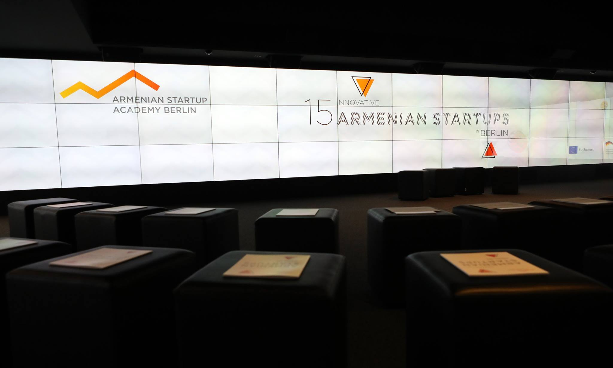 EU4Business-GIZ Armenian Startup Night in Berlin